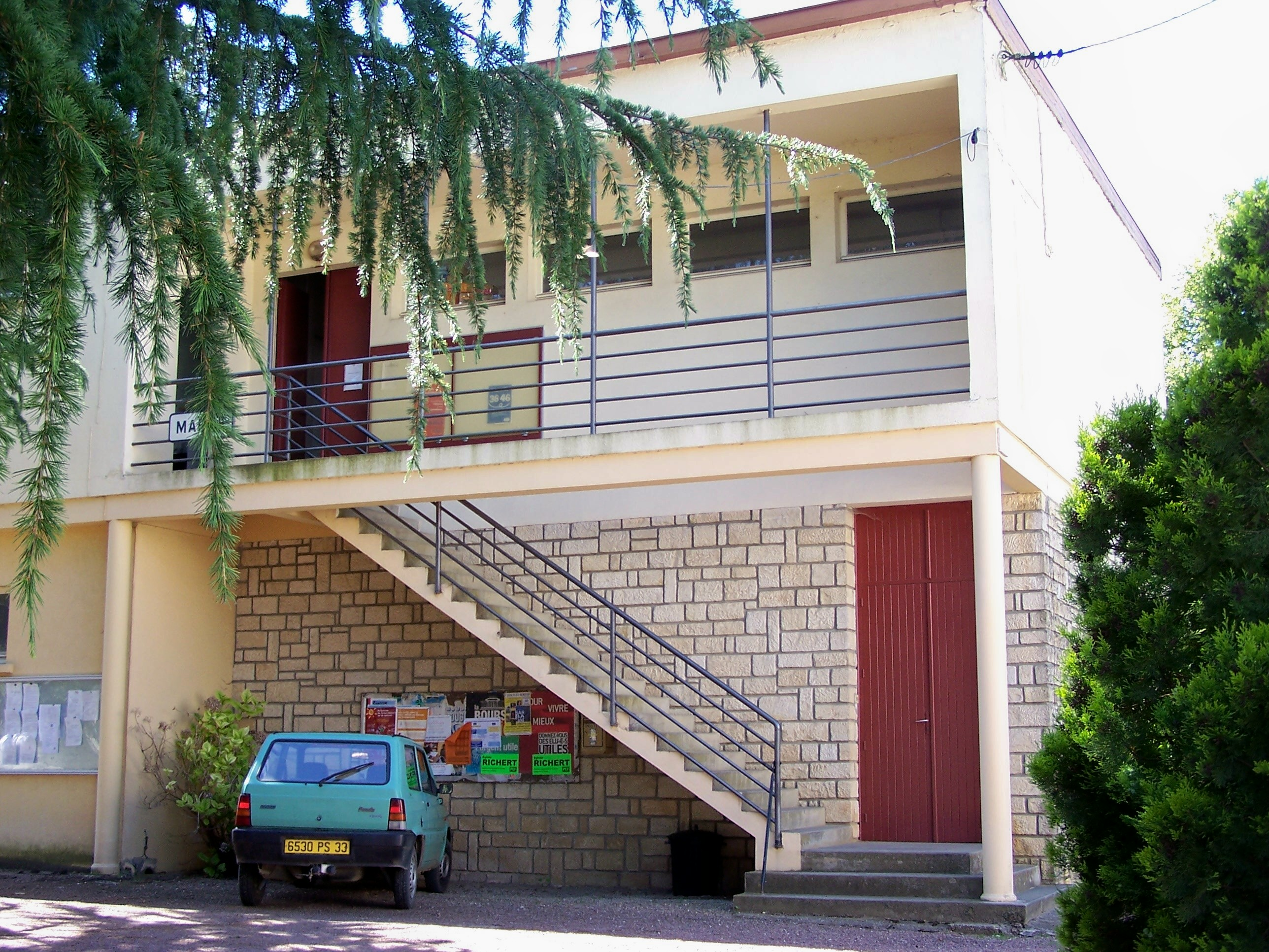 Mairie de Floudès, Gironde, France